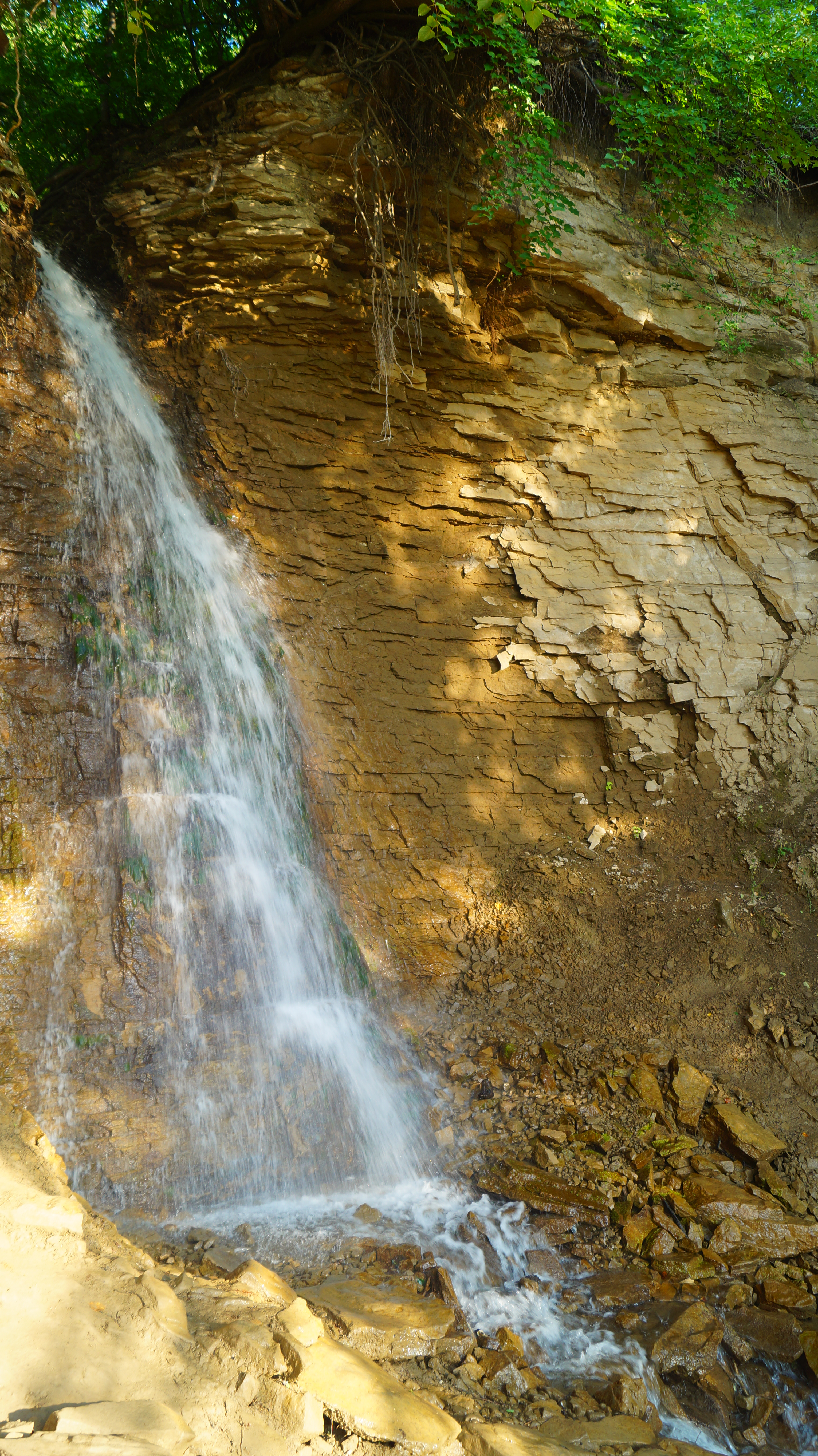 Аслы-Куль: Озеро Асылыкуль находится в 35 км от г. Давлеканово, территория самого парка - сельскохозяйственные земли Давлекановского, Альшеевского, Белебеевского и Буздякского районов, а также земли государственного лесного фонда, Давлекановский район, Башкортостан This image is related to the protected area of Russia number 0210115